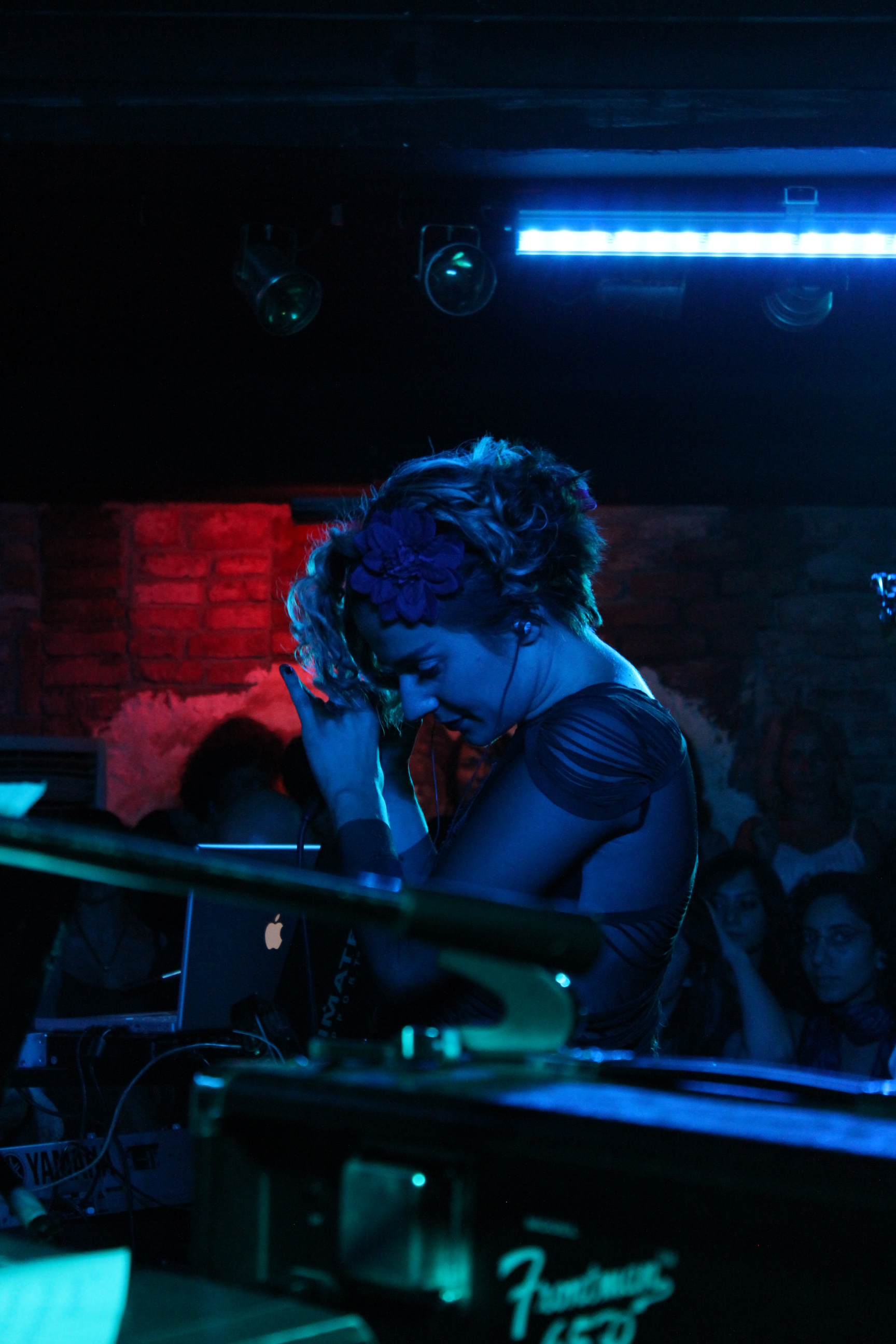 Ceylan Ertem, Ankara konserinde.